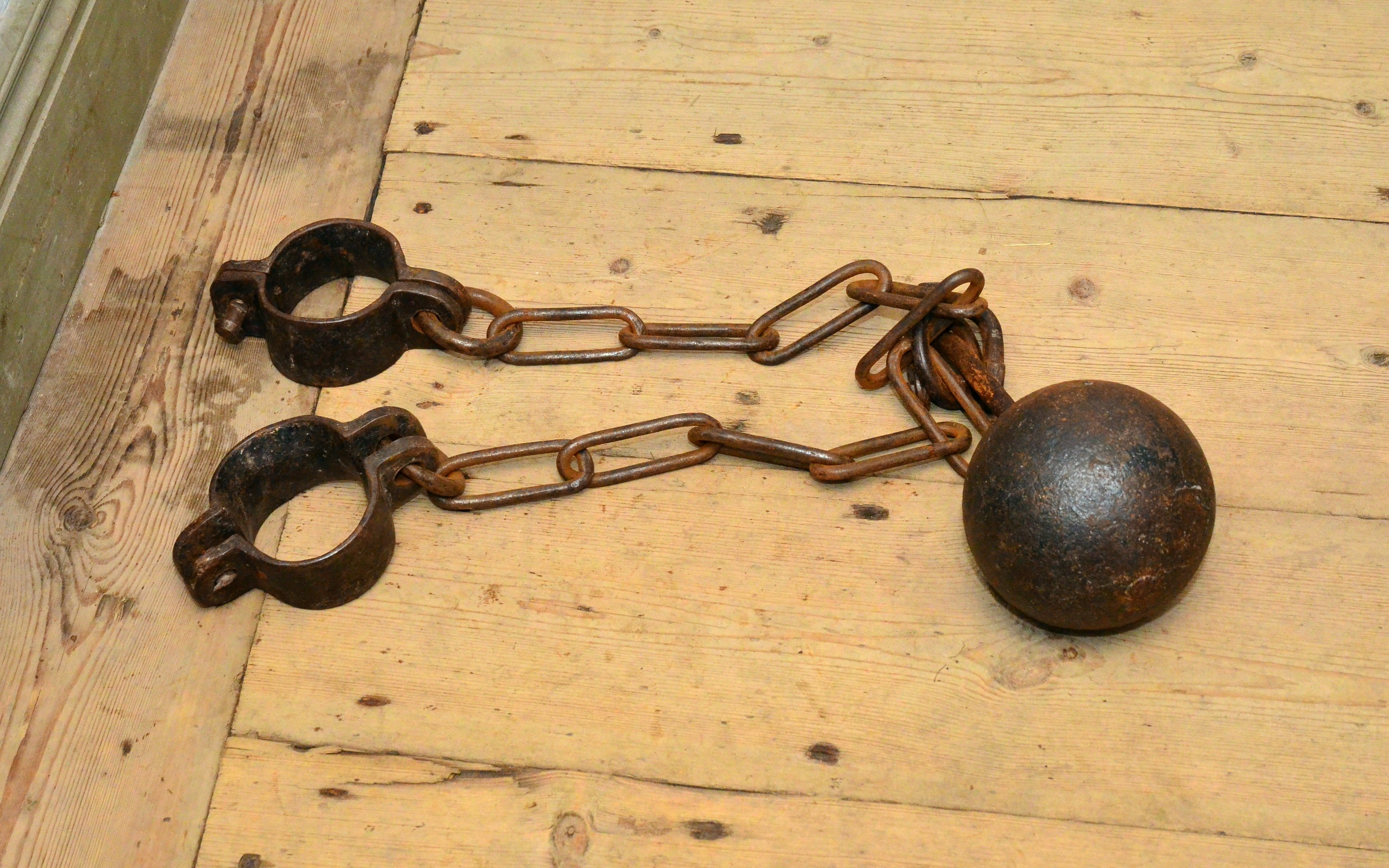 Fotbojor, Sagalunds museum, Kimito, Finland.